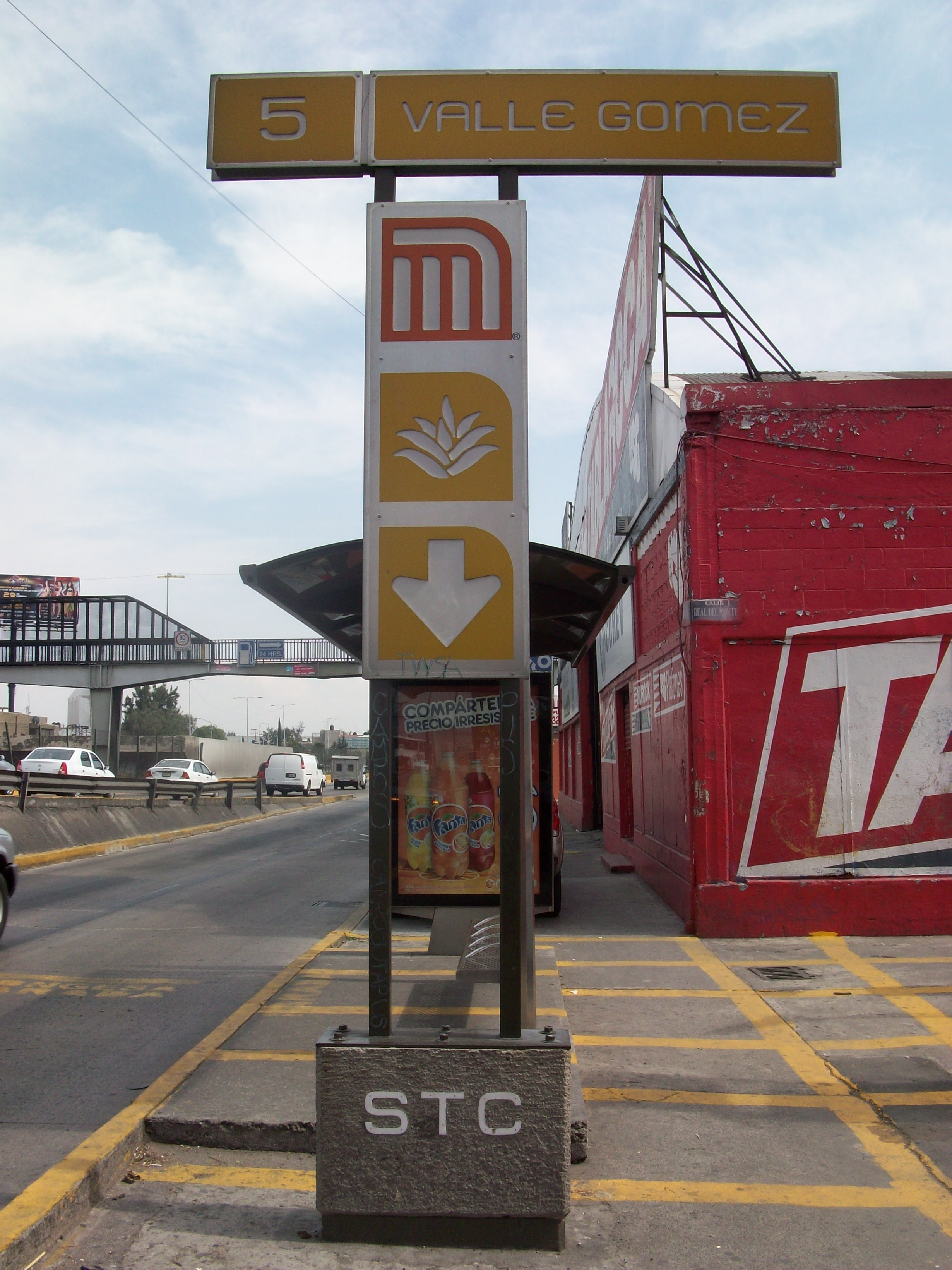 Estela de la estacion Eduardo Molina Valle Gomez